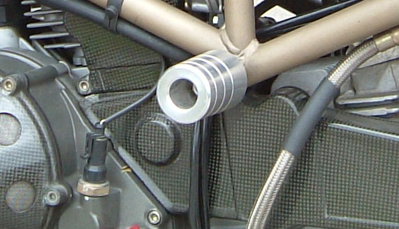 Toestemming van Huibert Raemakers